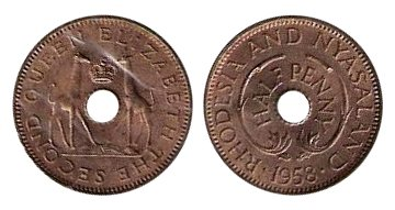 Rhodesia y Niasalandia: 1/2 penique 1958 Rhodesia and Nyasaland: Half penny 1958